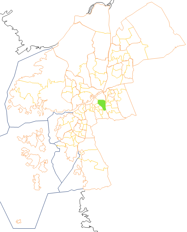 Karta som visar primärområdes belägenhet i Göteborg